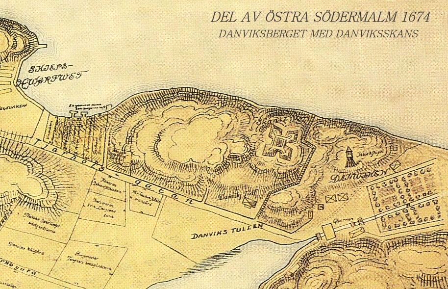 Del av östra Södermalm med Danviks tull och Danviks skans